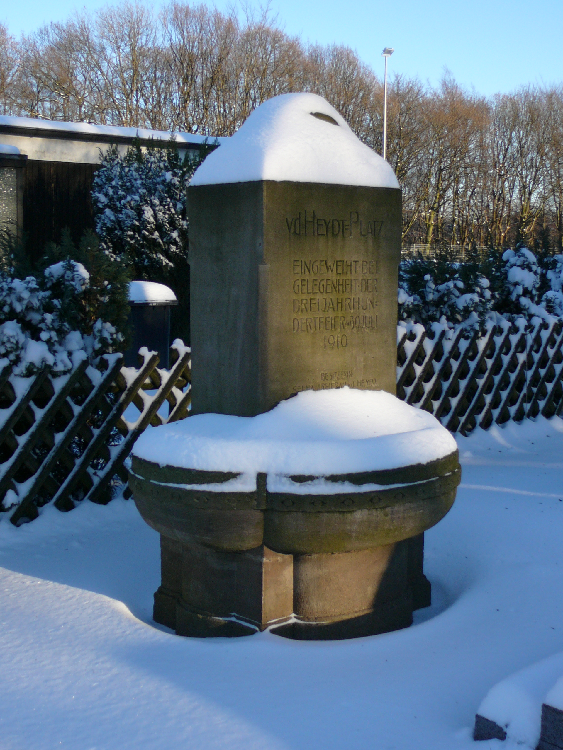 Am Freudenberg, Wuppertal